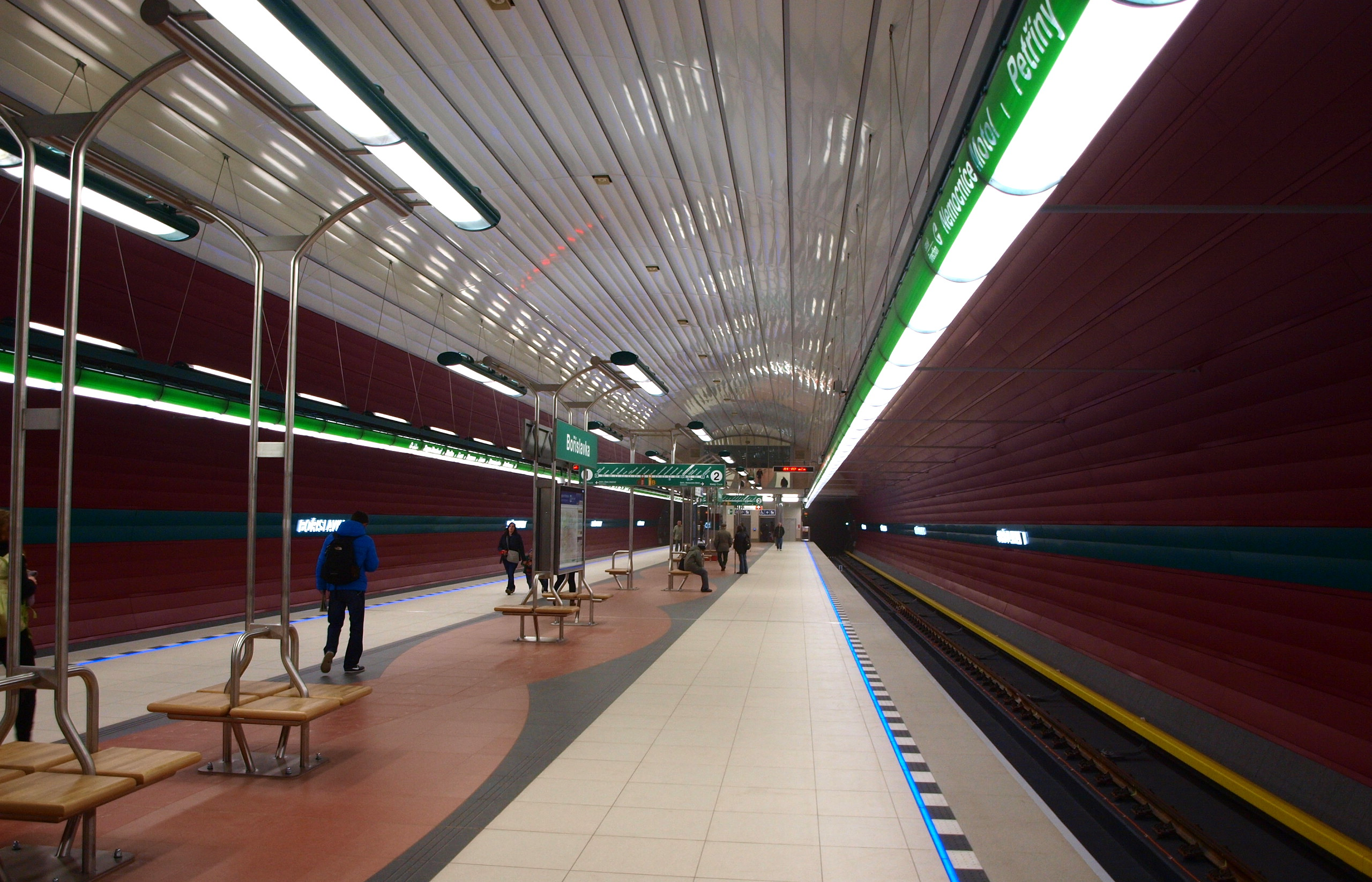 Satnice Bořislavka